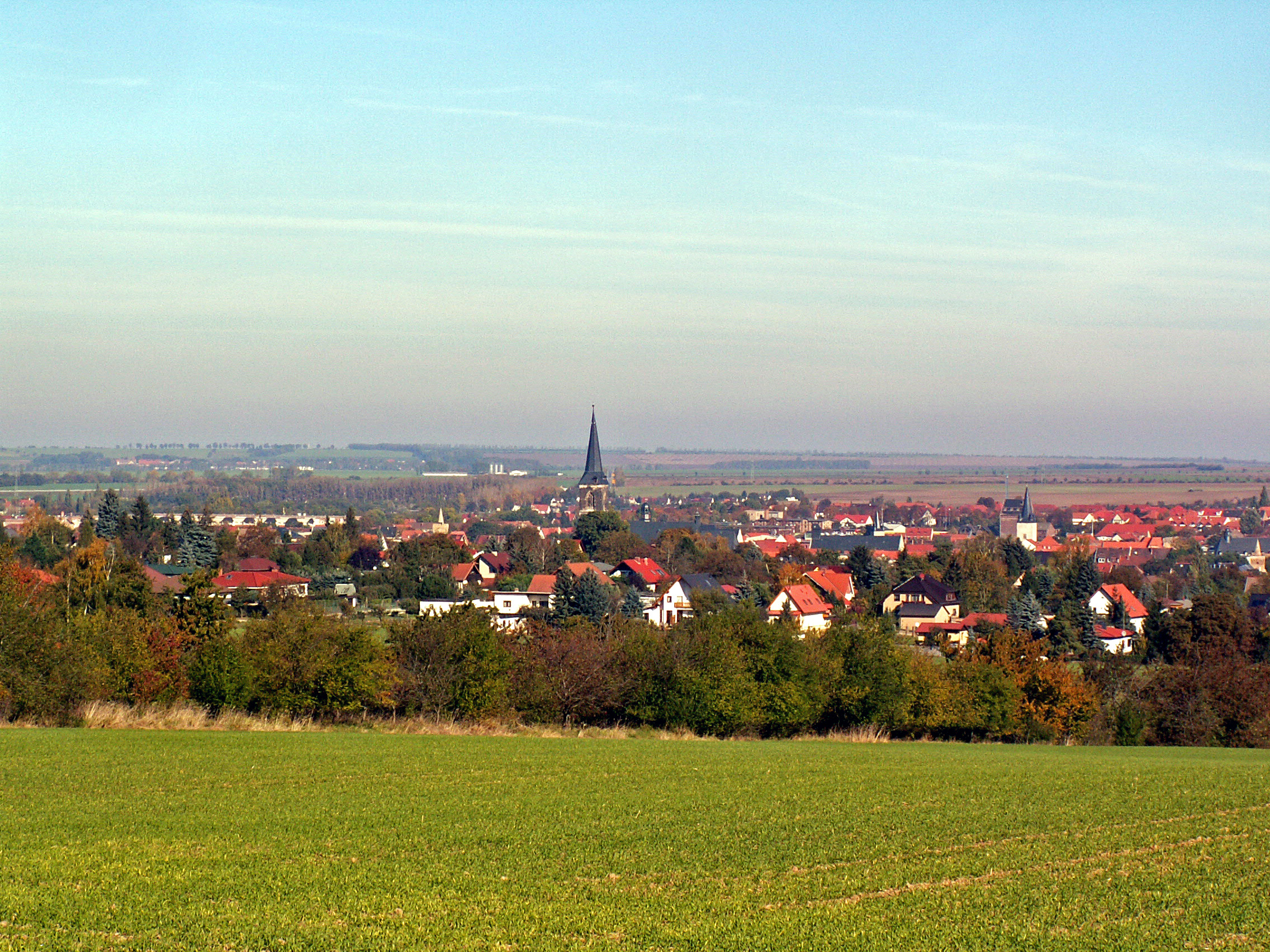 Blick über Aschersleben, Deutschland